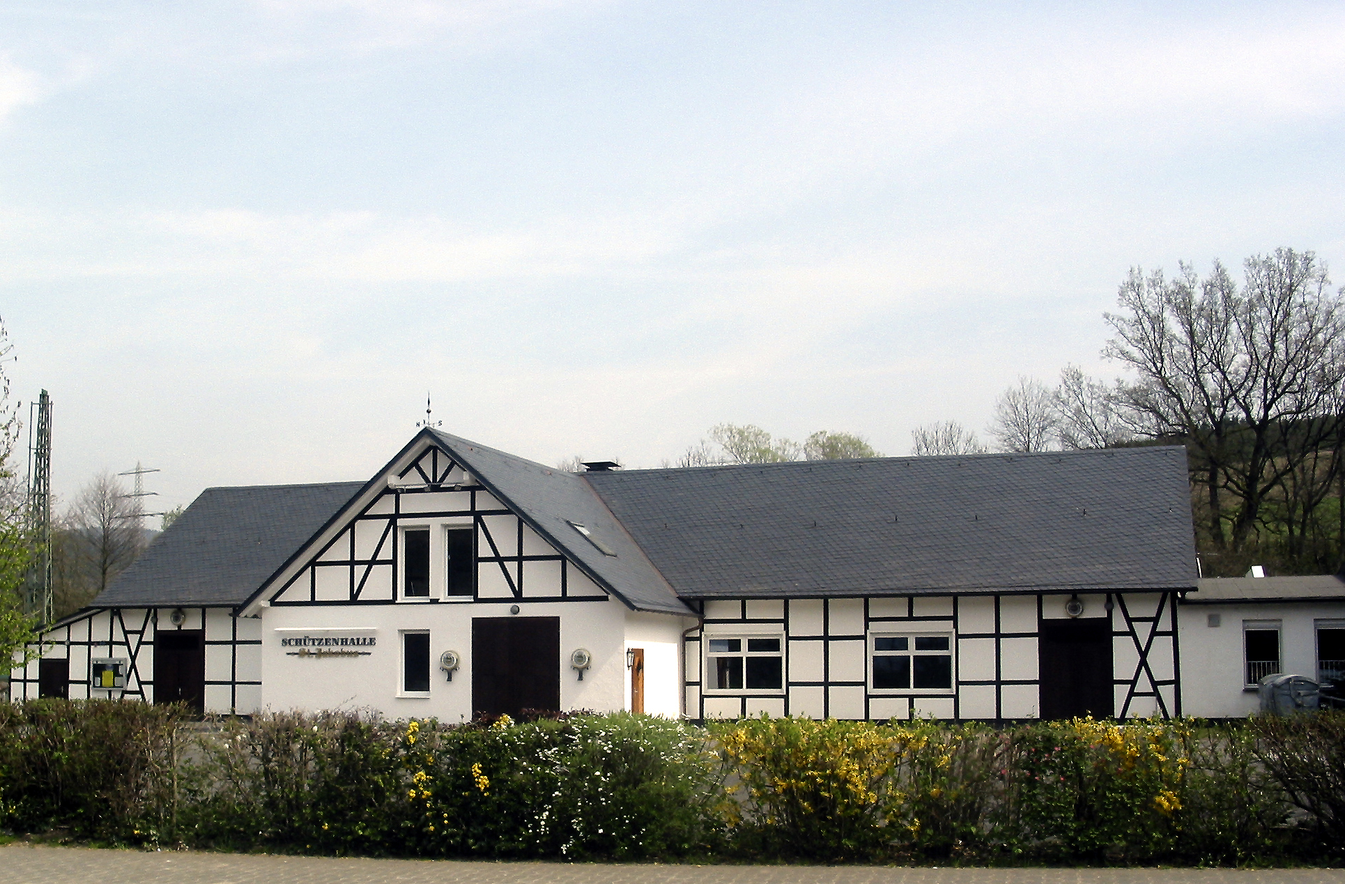 Die Schützenhalle der Schützenbruderschaft St. Jakobus 1873 e.V. Heringhausen, Bestwiger Str. 15. Baujahr 1921